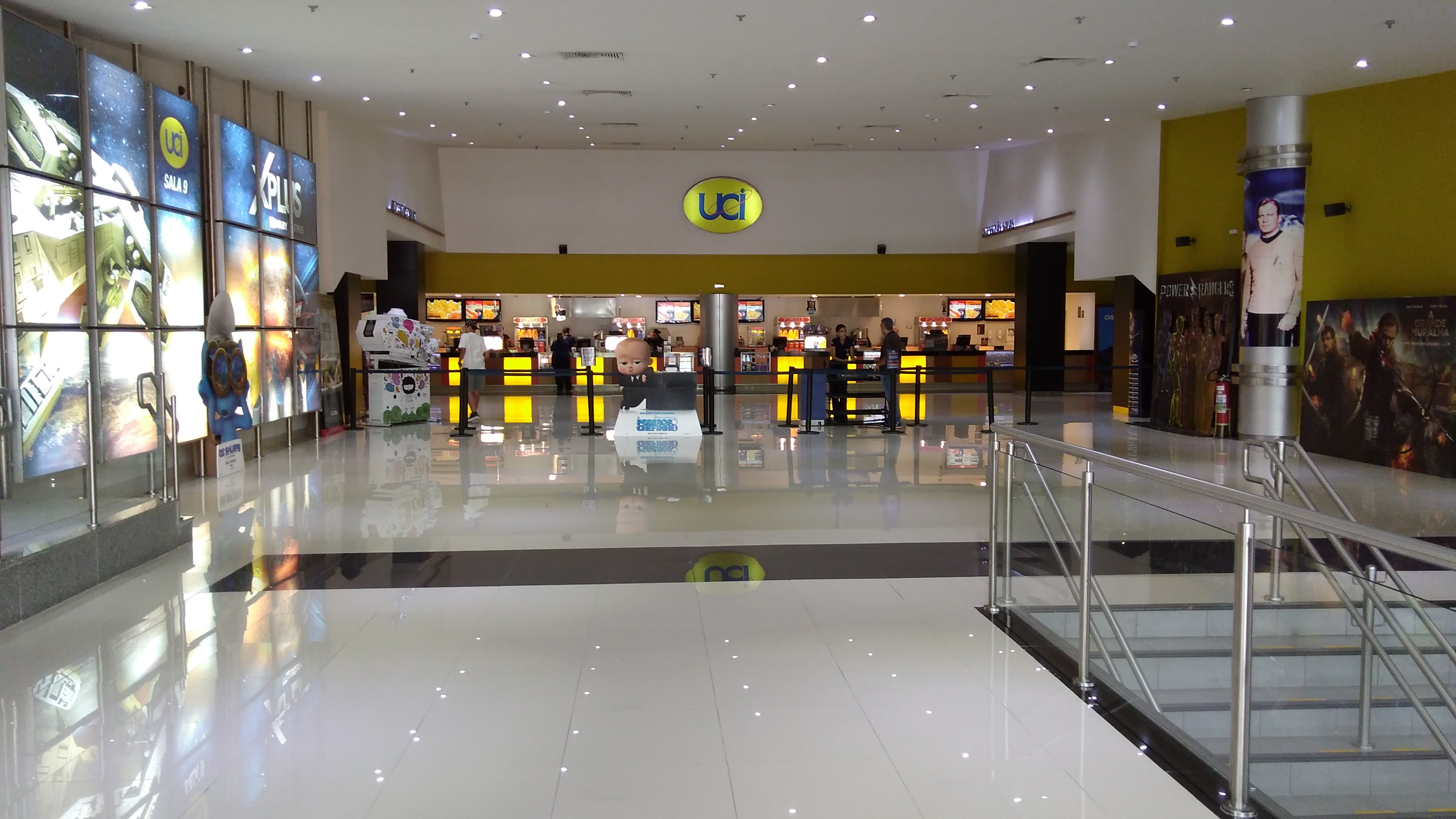 Entrada do UCI Jardim Sul de São Paulo, capital